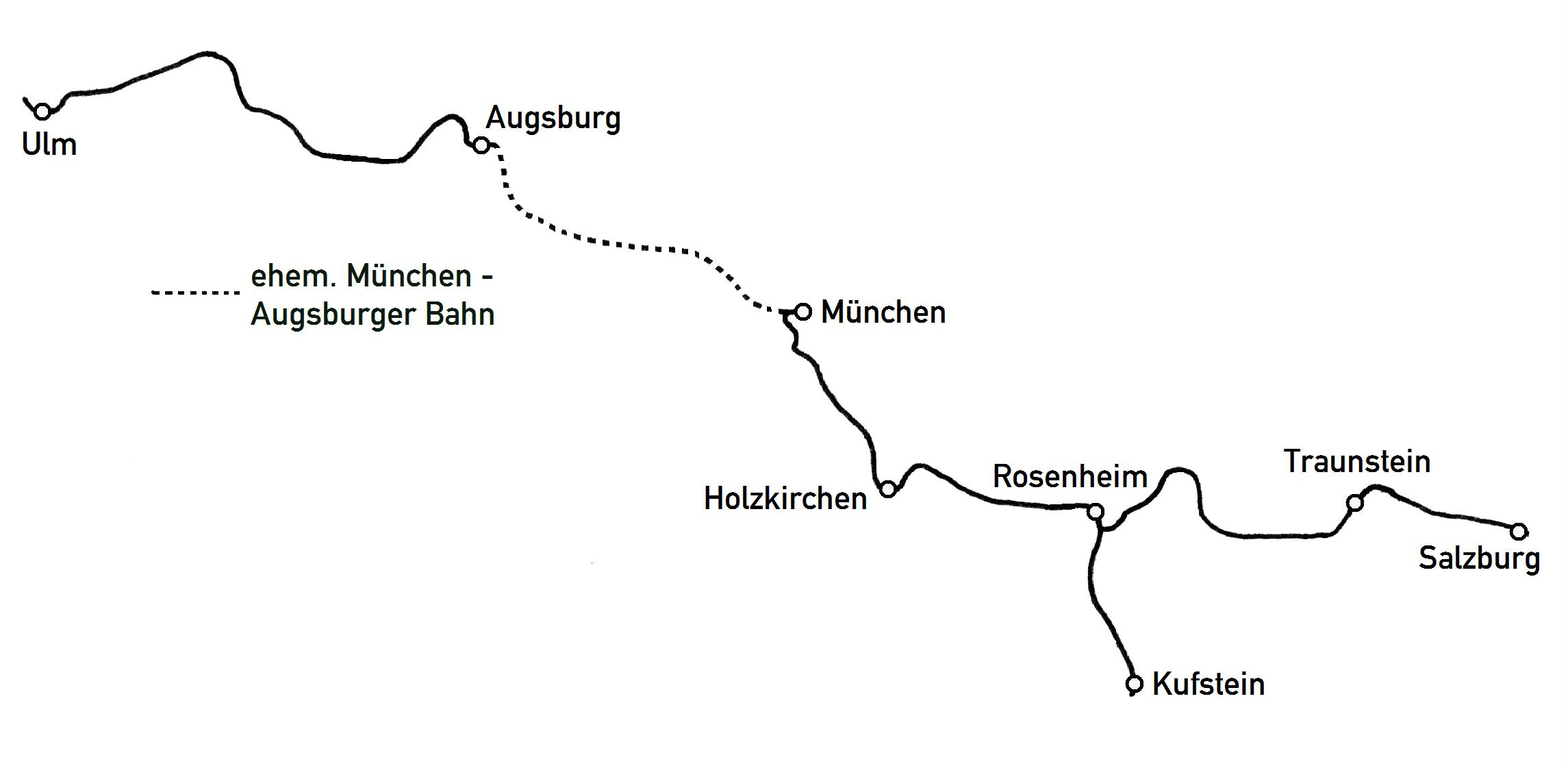 Streckenführung der bayerischen Maximiliansbahn